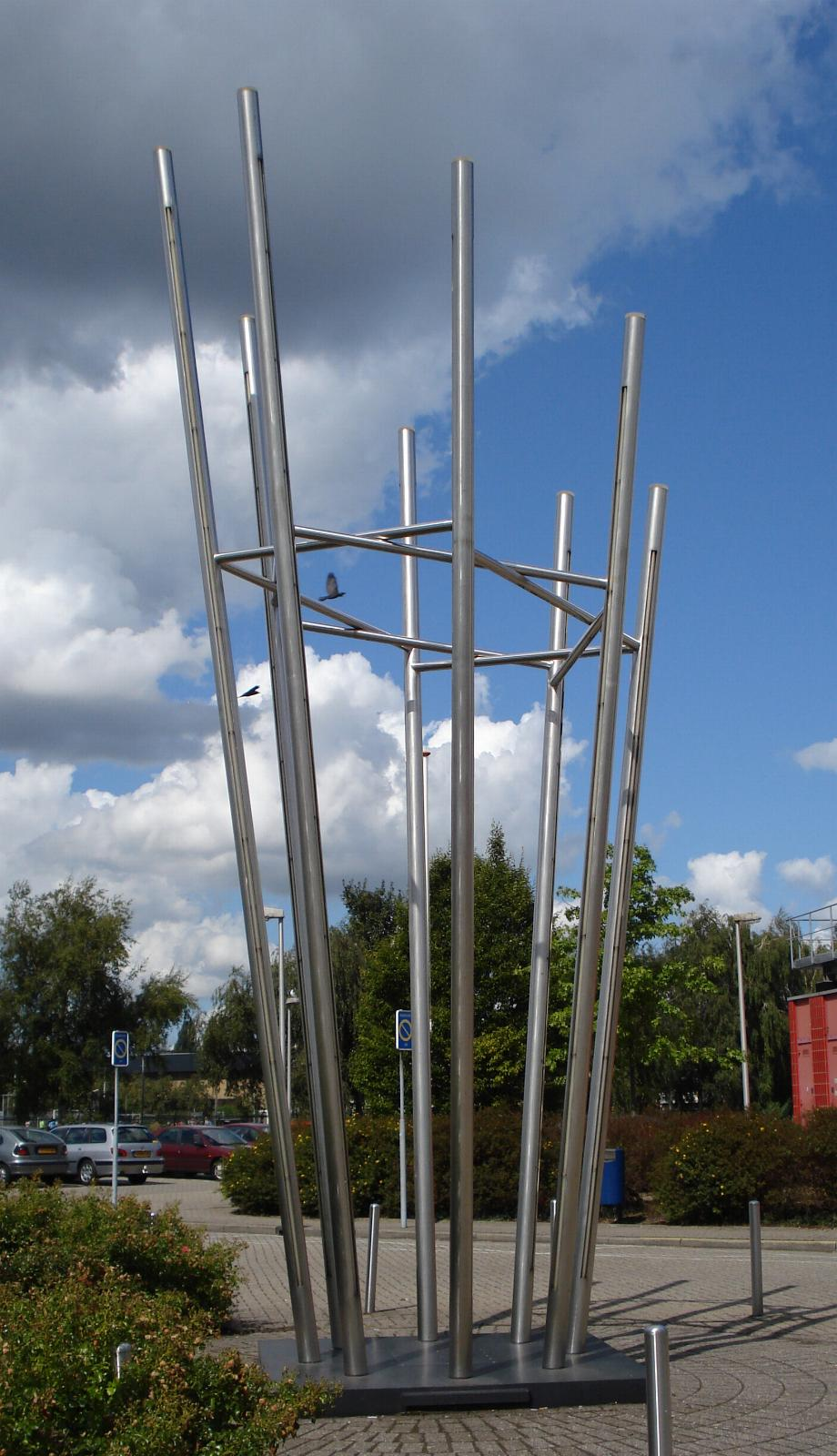 Capelle aan den IJssel, IJssellandziekenhuis. Kunstwerk "Exclamations" van Margot Zanstra. Capelle a/d IJssel/The Netherlands.